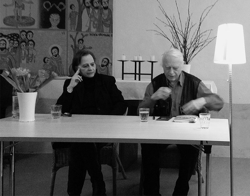 Rengha Rodewill und Horst Bosetzky, Buchvorstellung und Lesung -ky's Berliner Jugend - Erinnerungen in Wort und Bild, im Gemeindezentrum Alt-Schmöckwitz 1, Berlin-Schmöckwitz Bezirk Treptow-Köpenick, 2015.